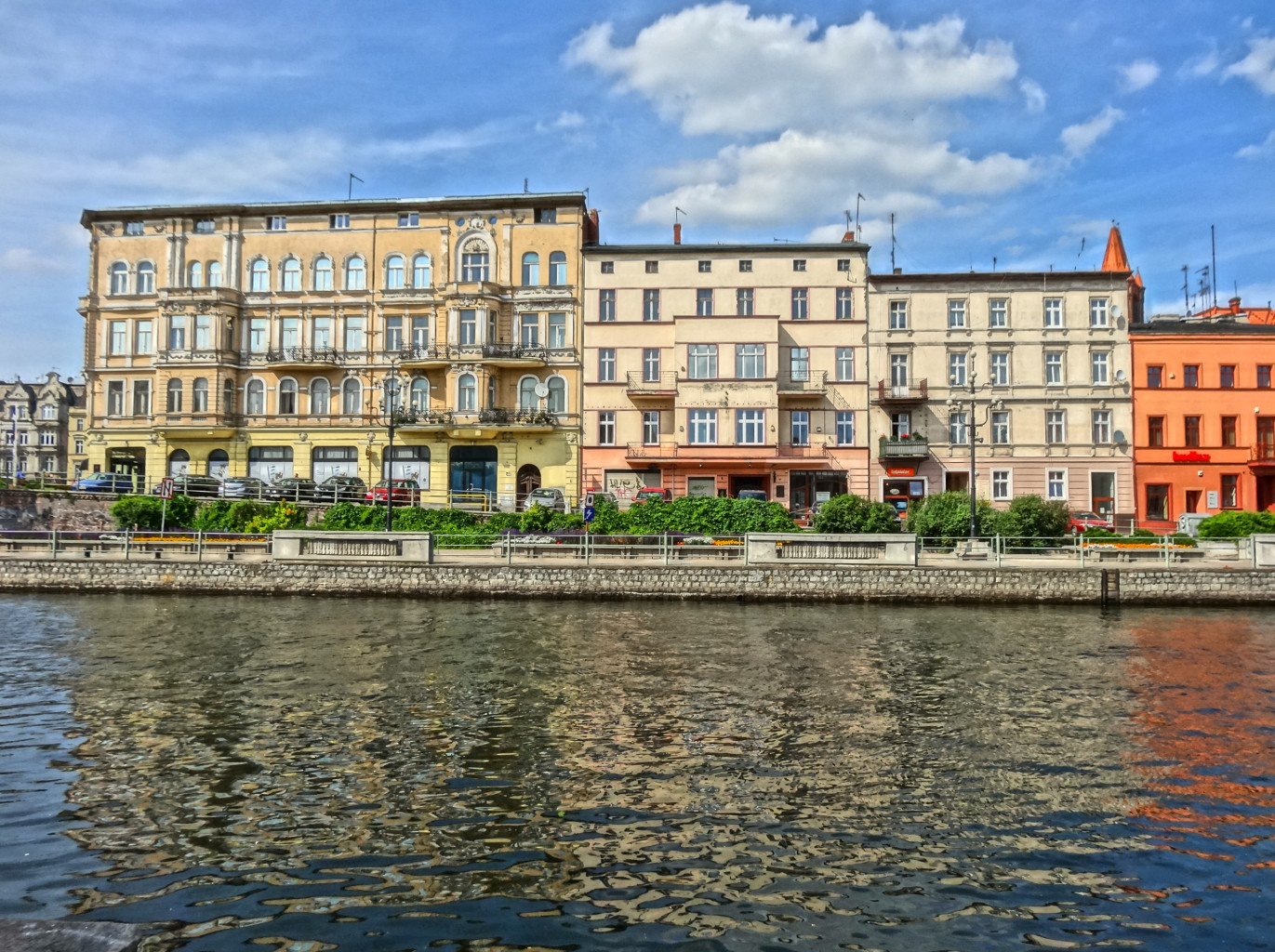 Północne nabrzeże Brdy w centrum Bydgoszczy - bulwar im. Zbigniewa Urbanyi